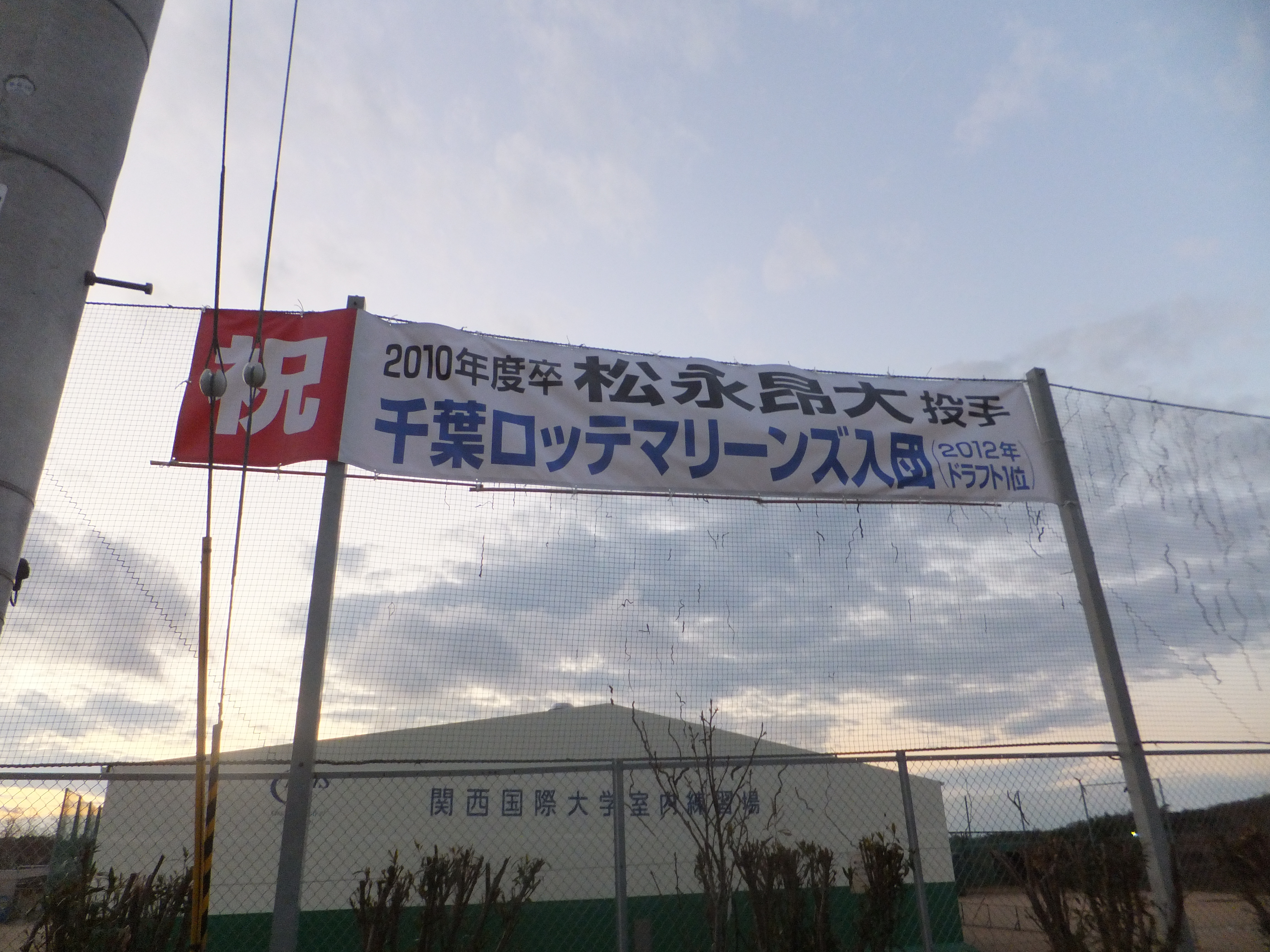 松田昂大 ドラフト記念垂れ幕